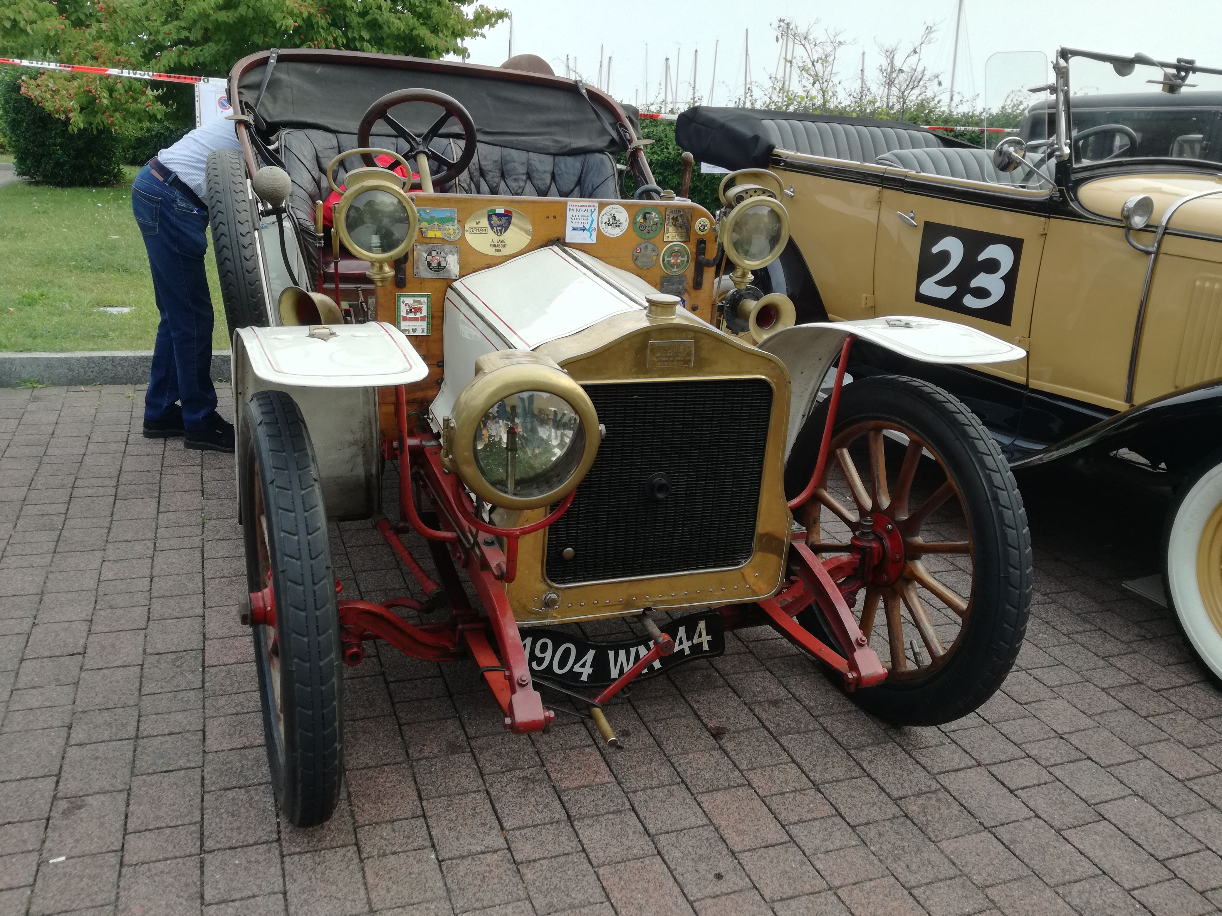 Auto d'epoca a Lesa